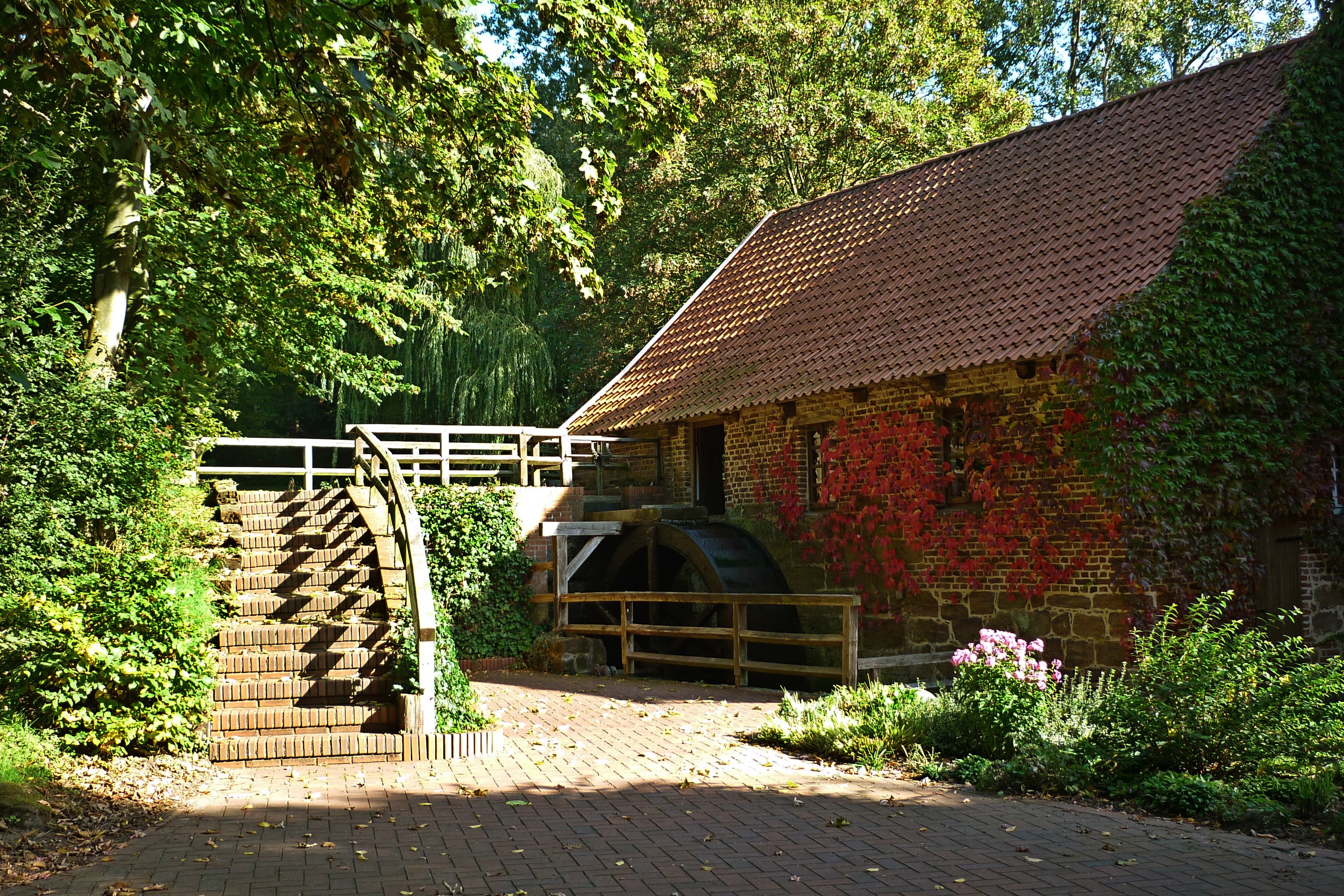 Bad Oeynhausen. Wassermühle "Schönen-Mühle" in Bergkirchen.